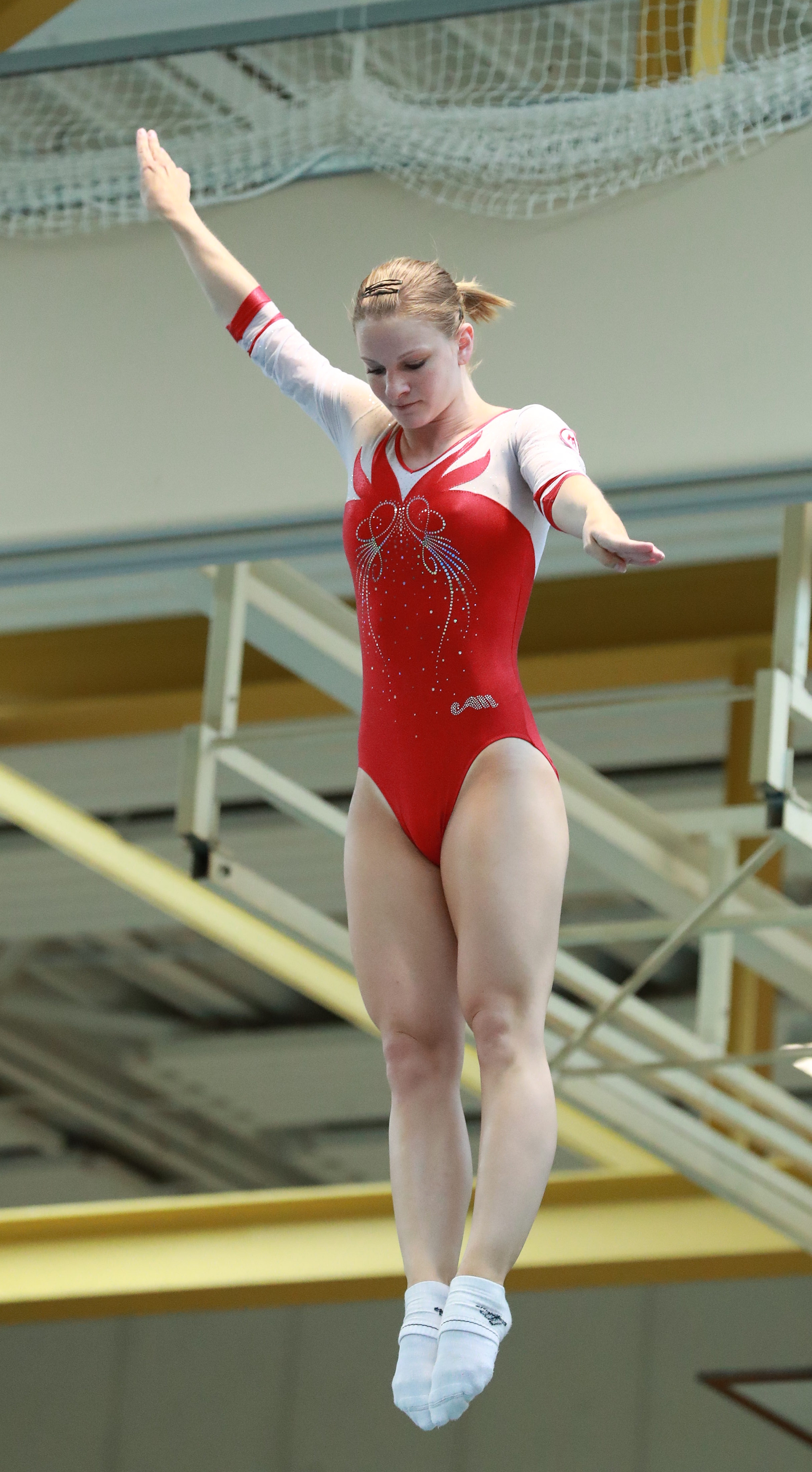 Wettkampf 9 Elite weiblich Erwachsene 2001 und älter Finale beim 9. Internationalen Filder Pokal im Trampolinturnen 2018 in Ruit. Abgebildet: Leonie Adam.